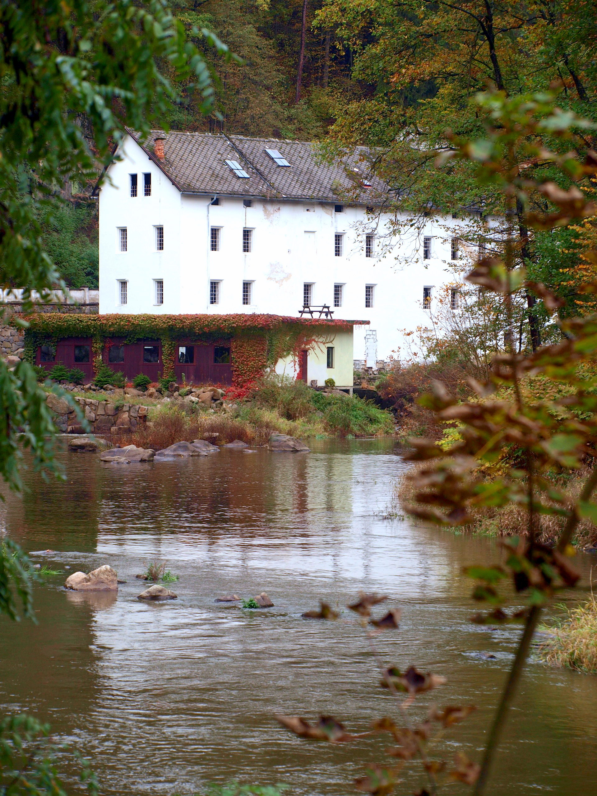 Benešův mlýn na Lužnici na okraji Tábora